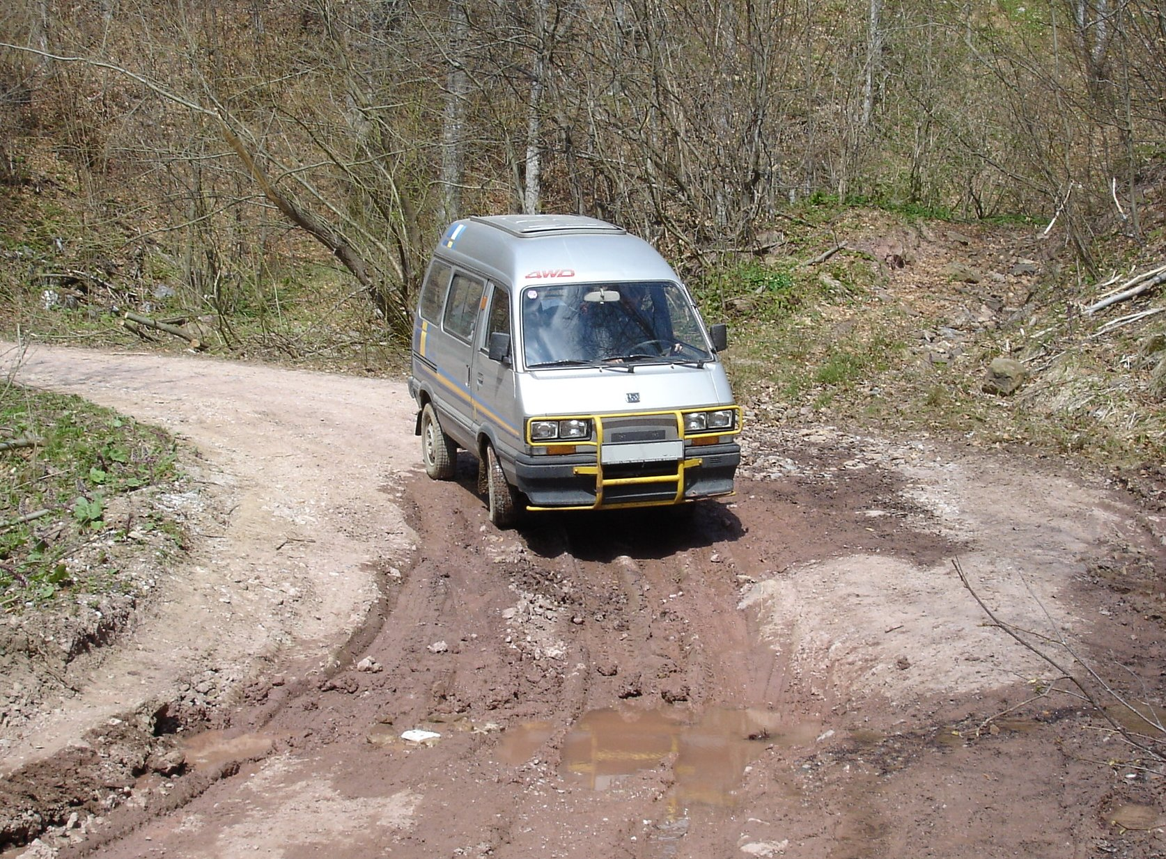 Subaru Libero E12, verze do 1993